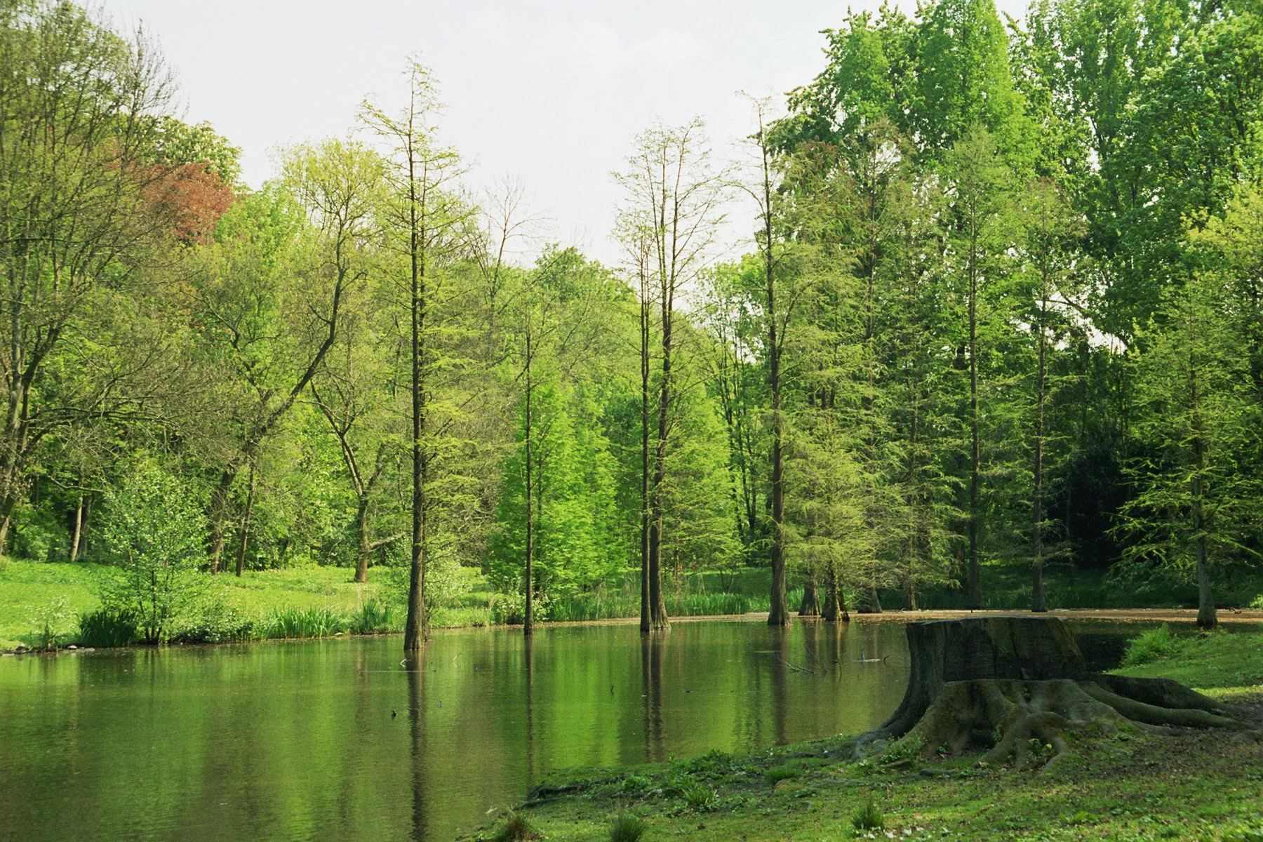 Sumpfzypressen (Taxodium distichum) im Rombergpark in Dortmund. Der Sumpfzypressenteich wird vom Pferdebach gespeist.